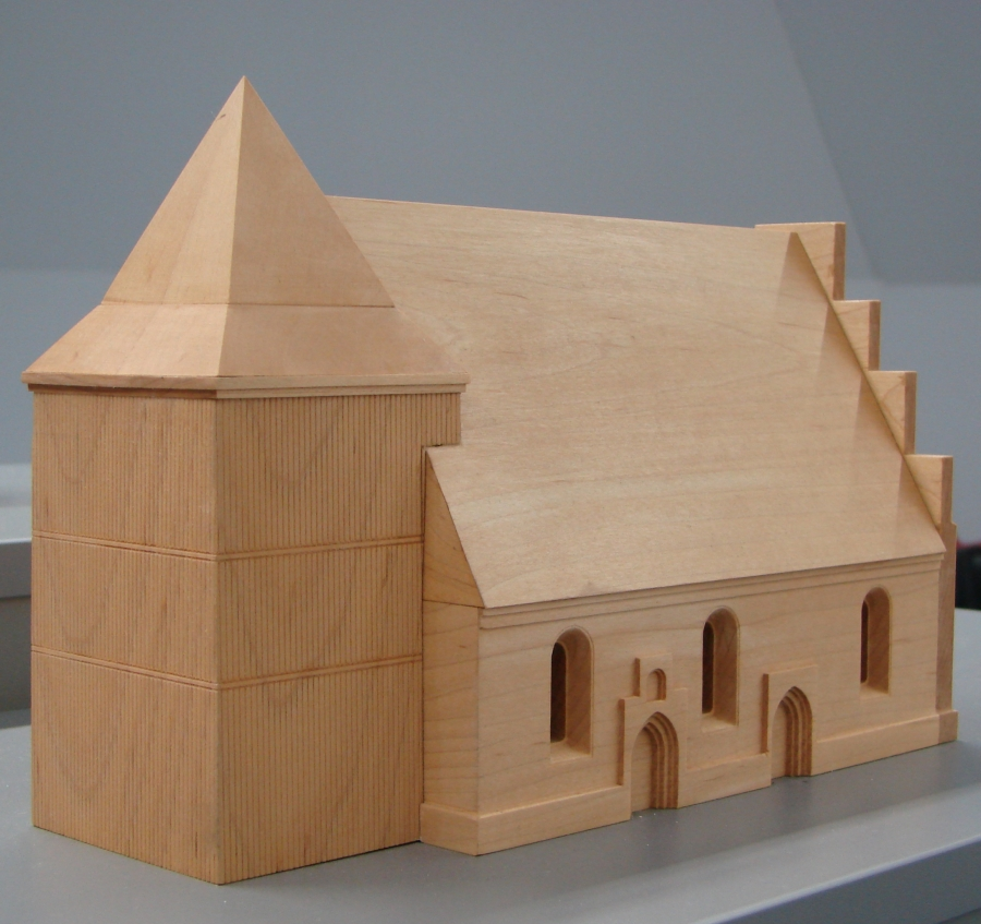 Nachbau der Kirche Wolkenberg (bei Spremberg) als Holzmodell. Ausstellung "Verlorene Heimat" im kirchlichen Informations- und Begegnungszentrum Horno.